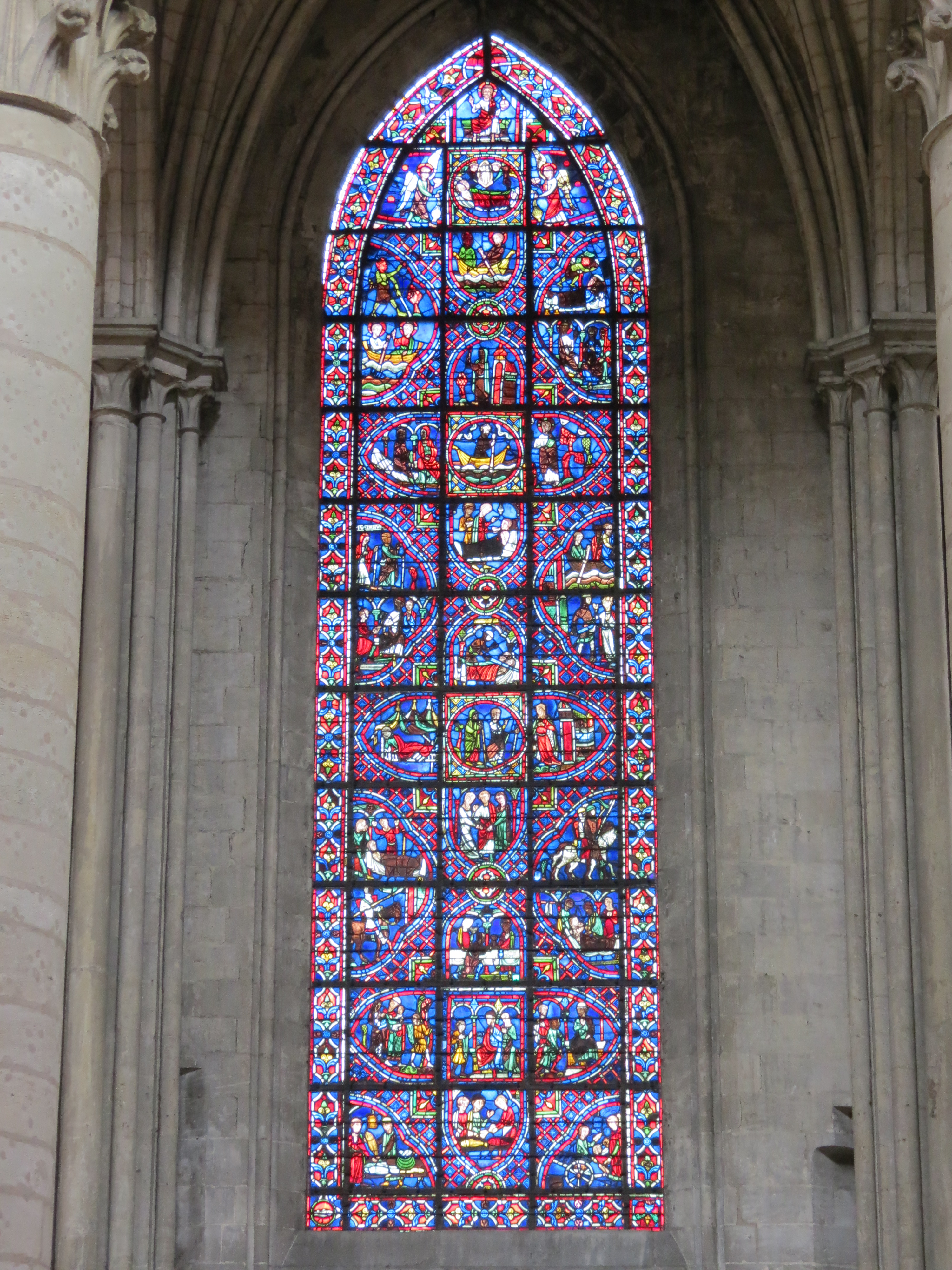 Baie 23 - Vitrail de Saint-Julien-l'Hospitalier, dans le déambulatoire nord.